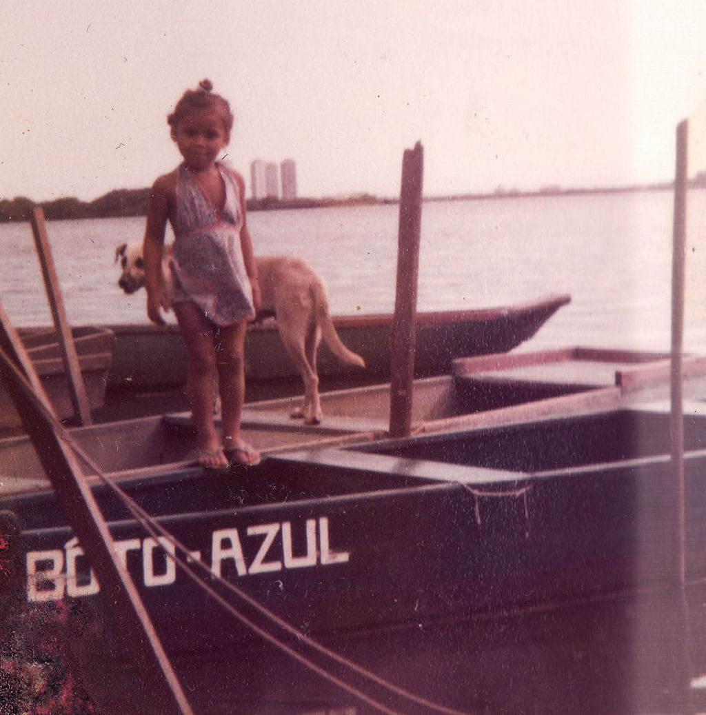 Os pescadores também viviam do aluguel de barcos. Na foto a filha de uma das mais tradicionais famílias de pescadores do Arroio Pavuna, brincando sobre o barco Bôto-Azul, 1980.